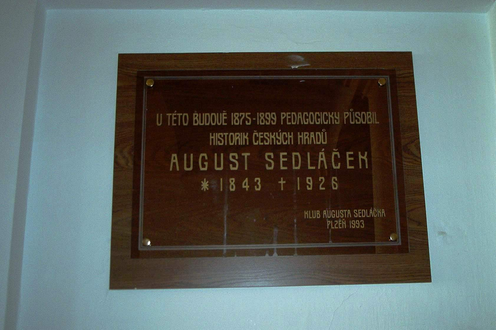 Pamětní deska prof.A.Sedláčka v původní budově reál.gymnázia v Táboře